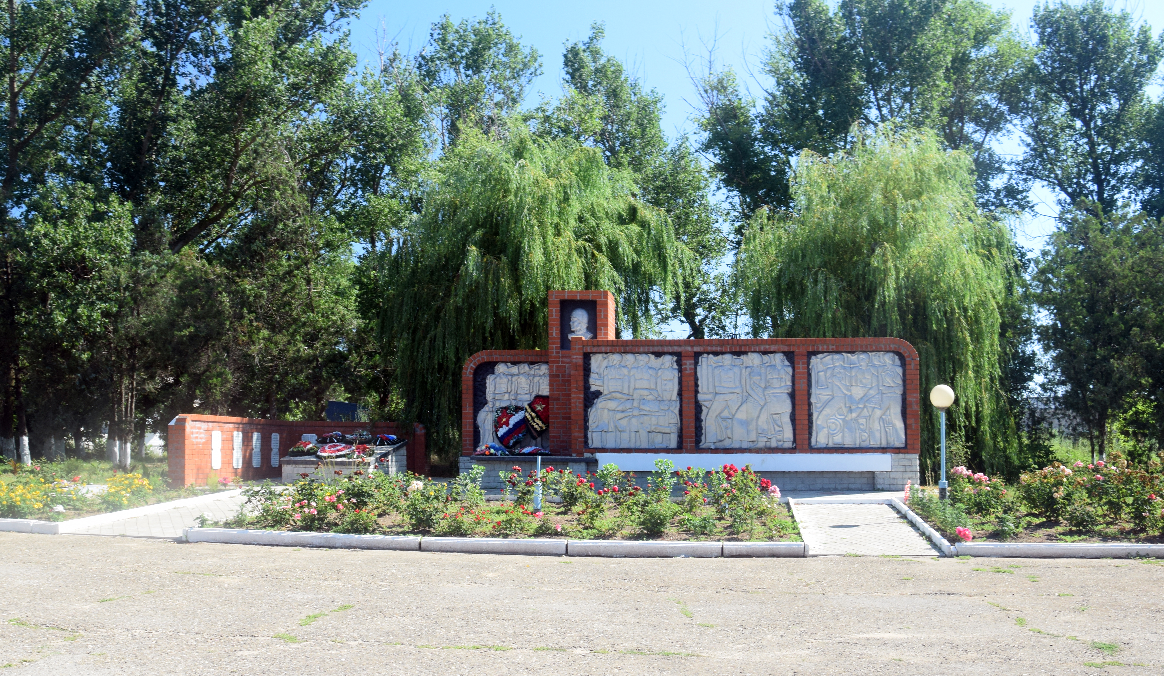 Братская могила и мемориал славы советским воинам Темрюкский район, пос. Кучугуры, ул. Ленина